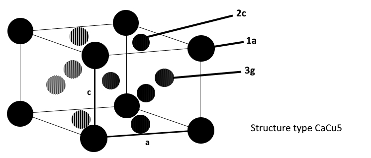 Représentation de la structure de type CaCu5 de certains composés intermétalliques